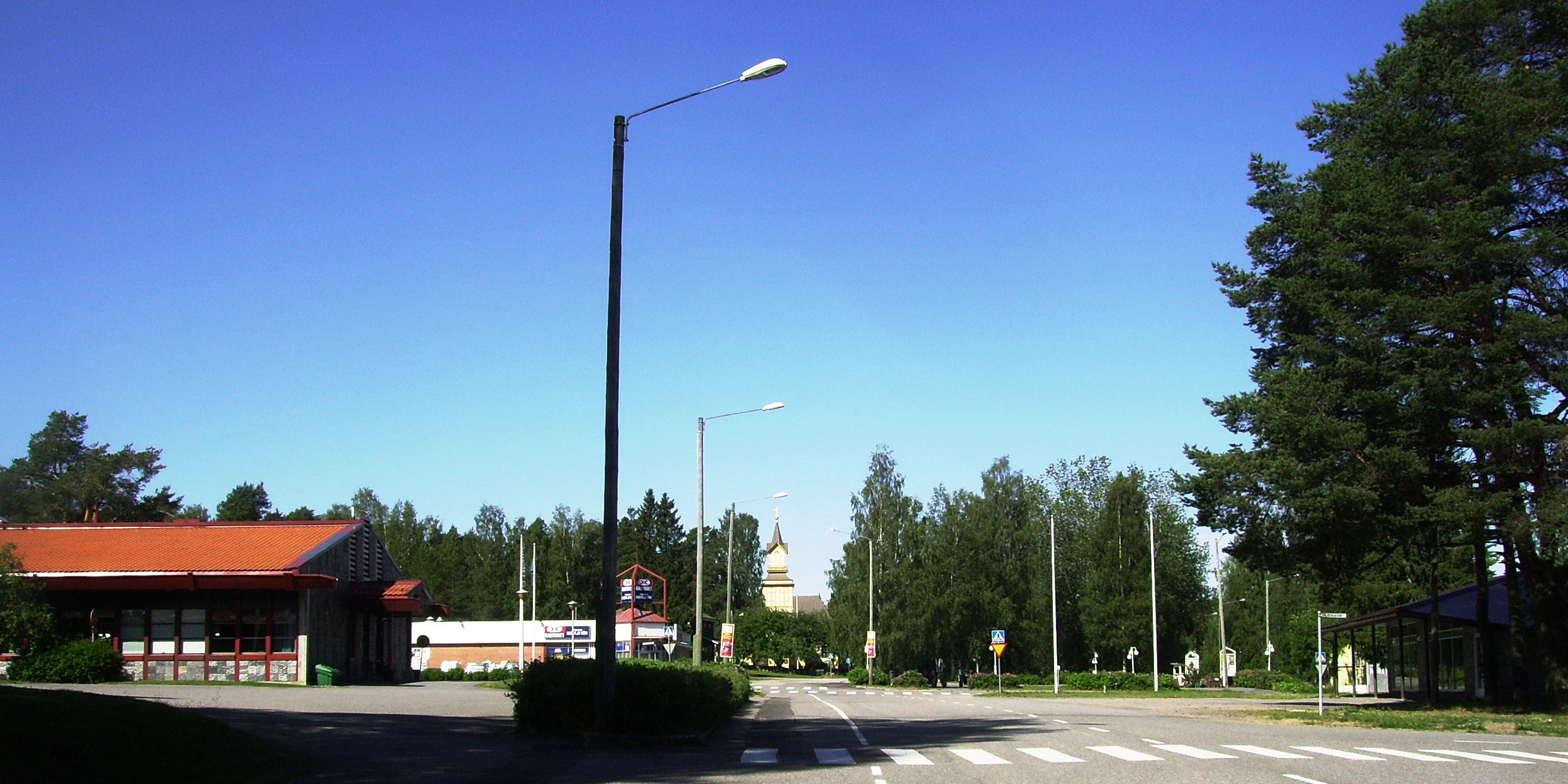 En gata i Pihtipudas i Centrala Finland